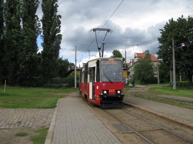 MZK Bydgoszcz